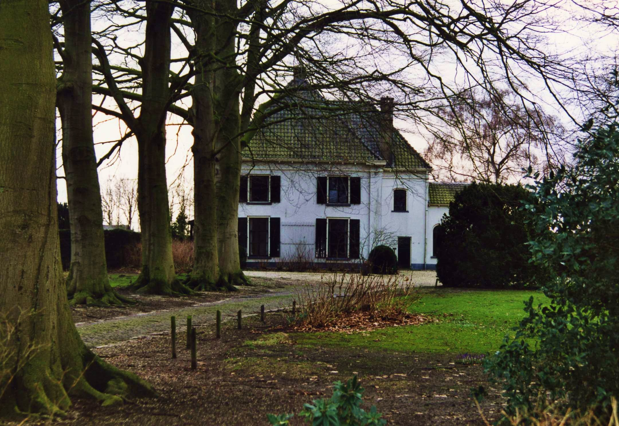 Huis 't Groot Have te Almen, mogelijk de opvolger van 't Hof te Almen.